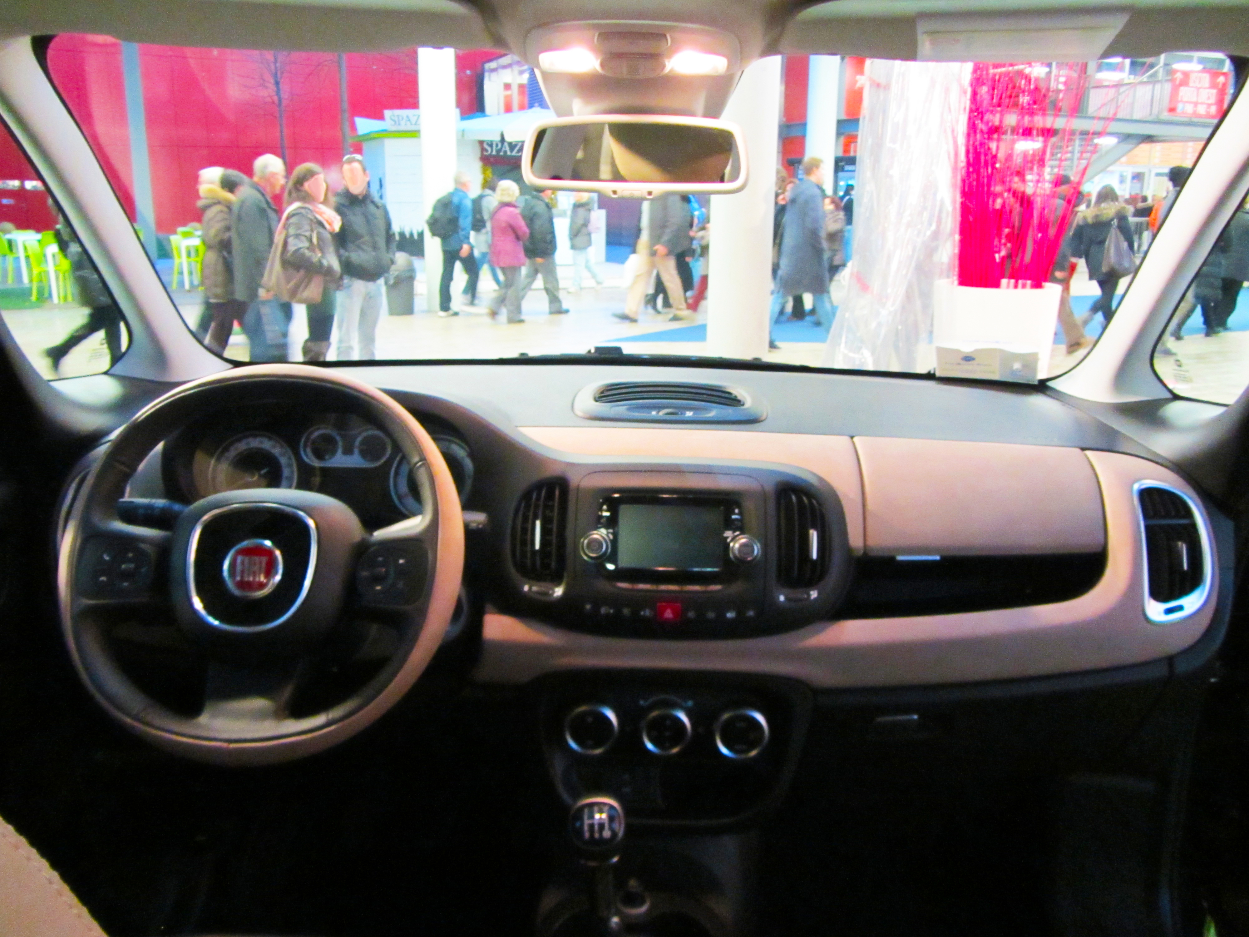 Una Fiat 500L Alla Fiera dell'artigianato a Milano (interni)